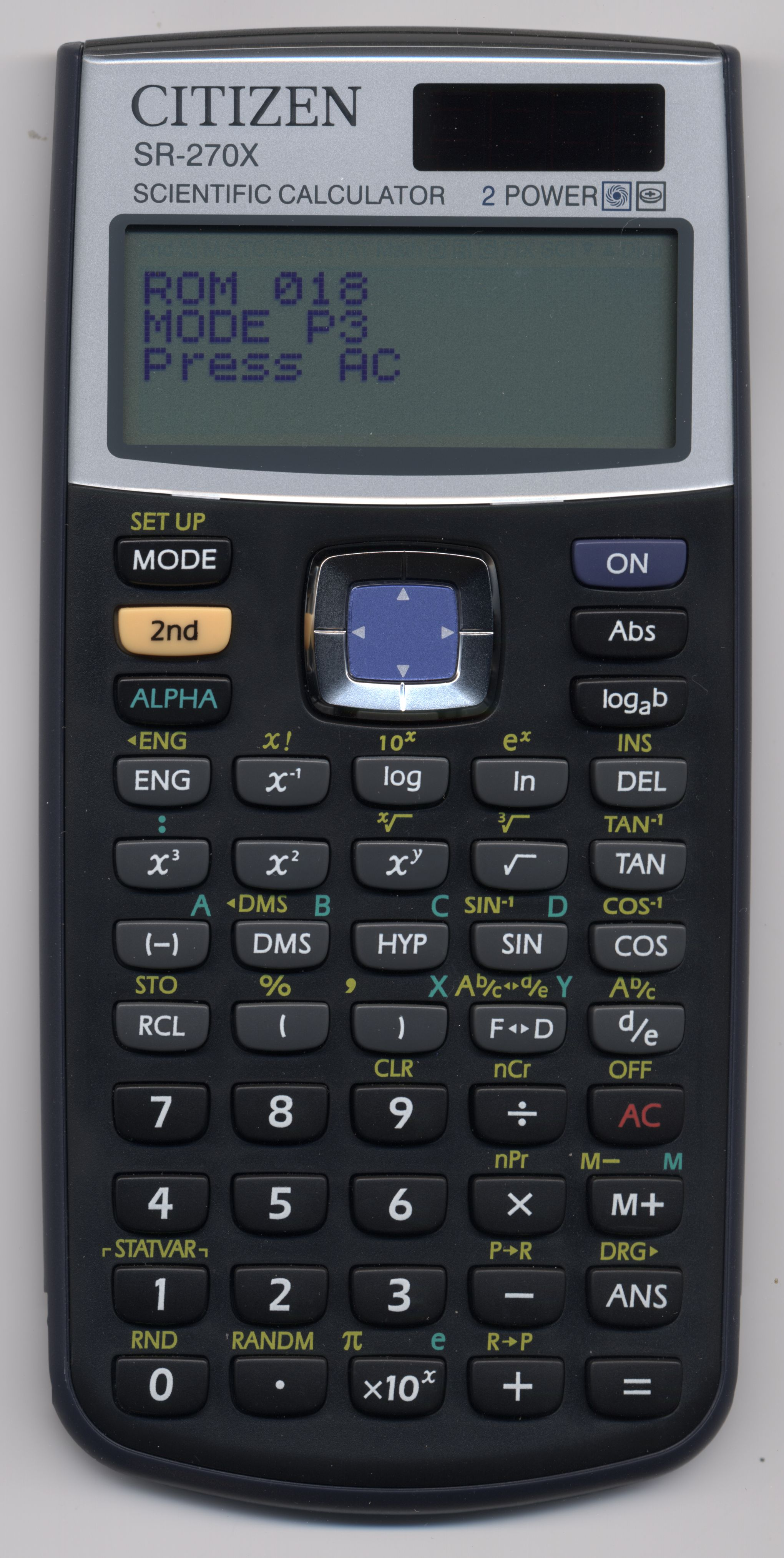 CITIZEN SR-270X, clone de la CASIO fx-82es